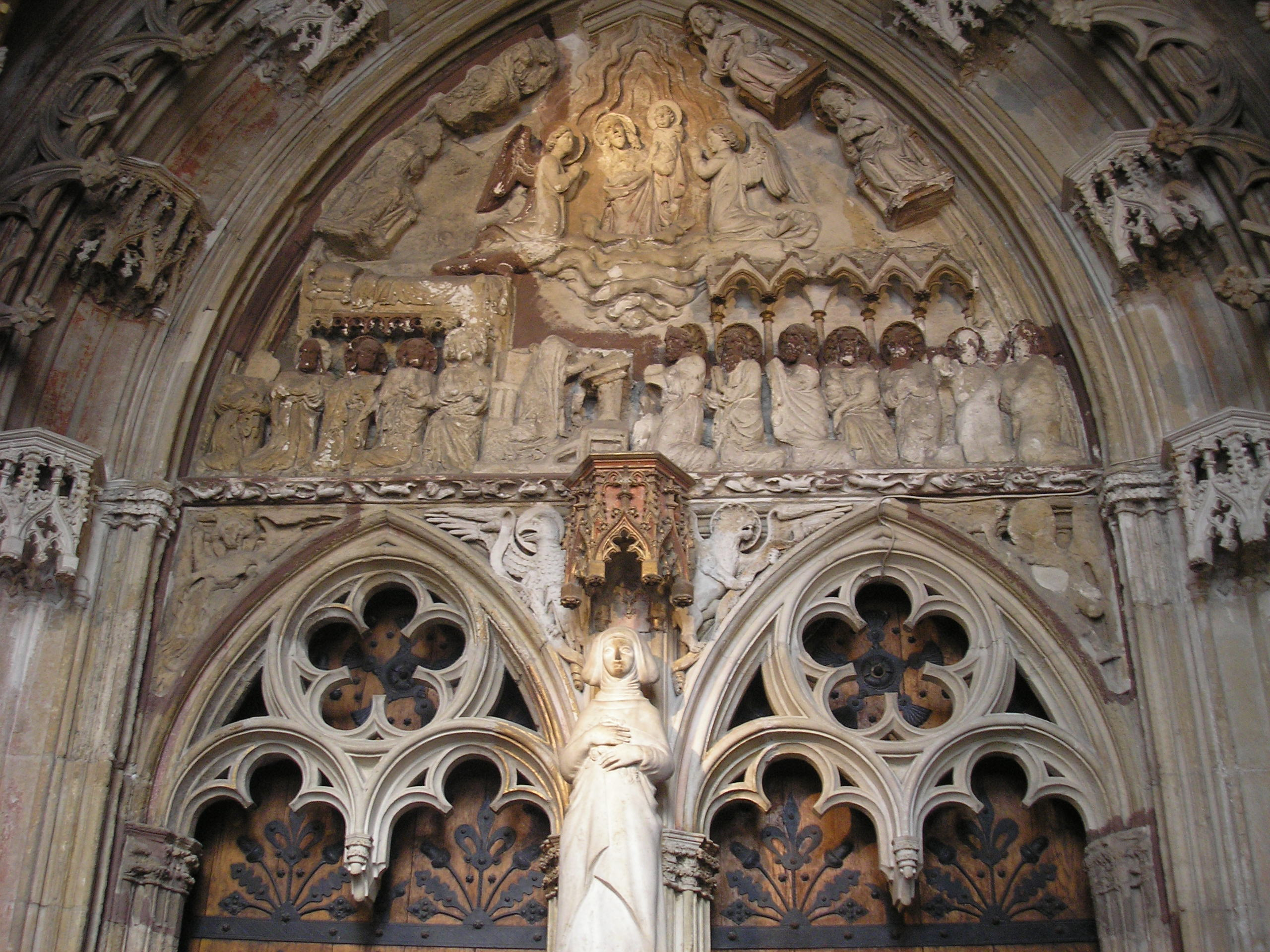 Marienportal der Matthiaskirche